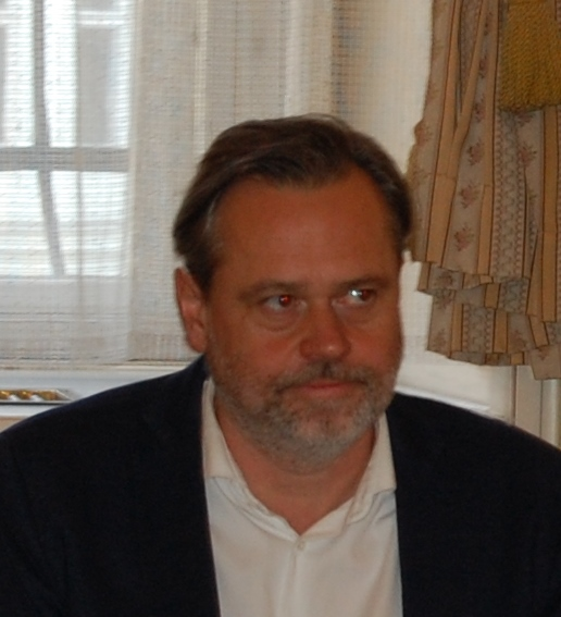 Robert Kerndl